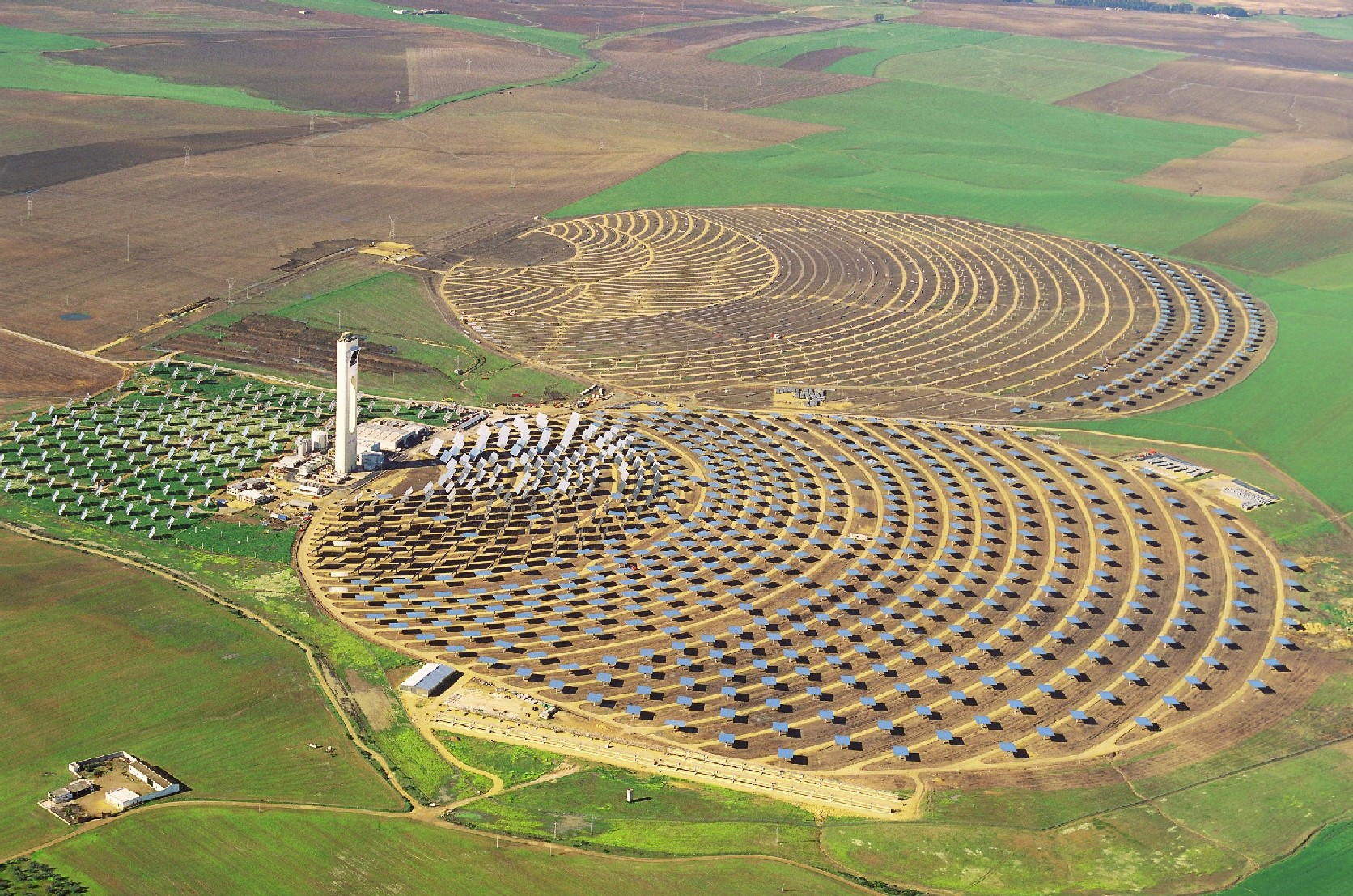 Vista aérea de la Plataforma Solar de Sanlúcar la Mayor con las plantas PS10, PS20 (en construcción en la foto) y Sevilla PV.